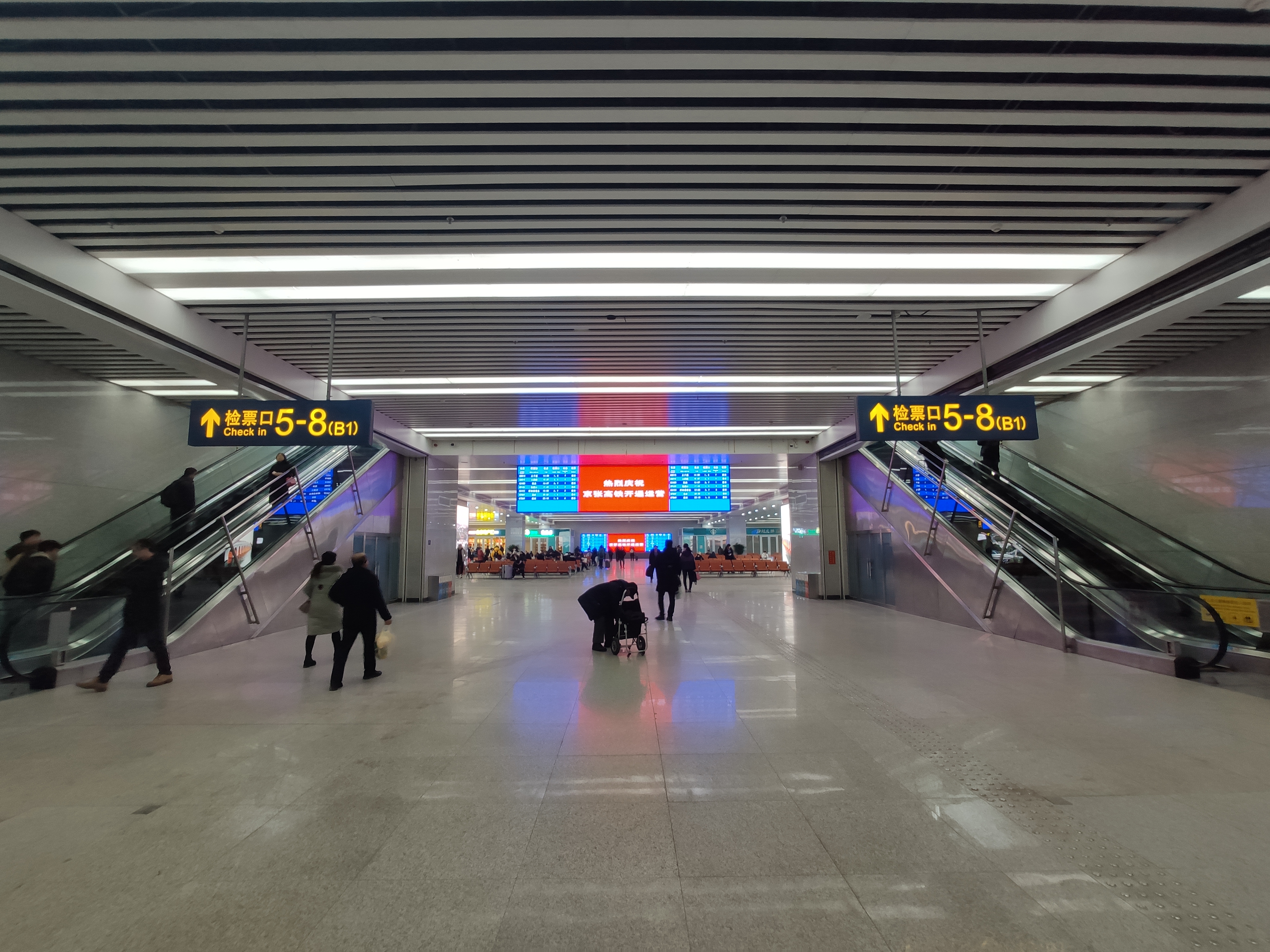 中文（中国大陆）: “热烈庆祝京张高铁开通运营”。